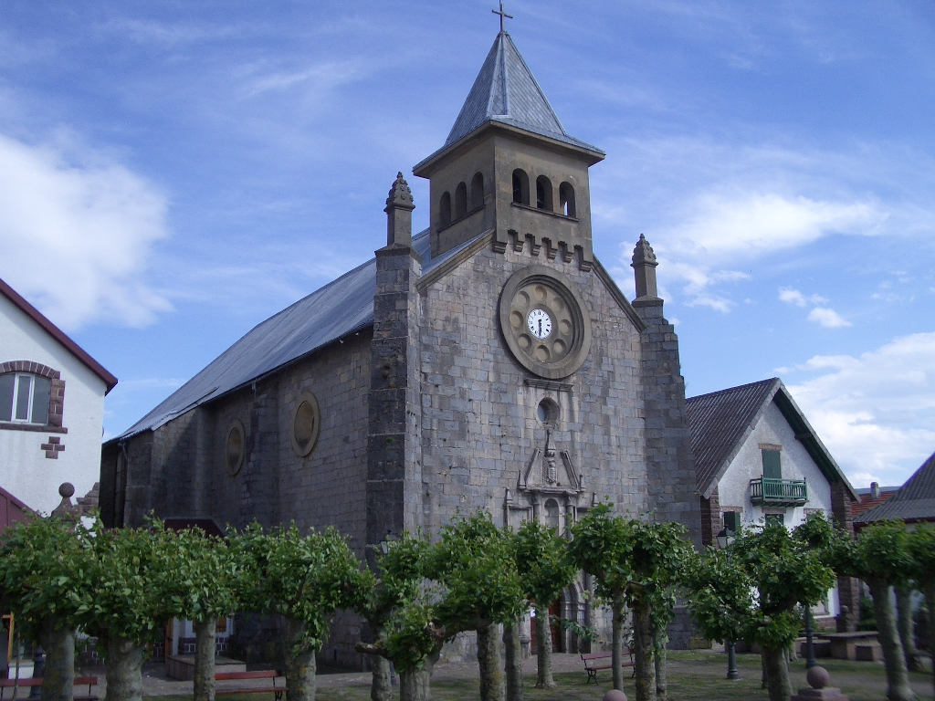 Exterior de la iglesia de San Nicolás (Burguete). La iglesia de origen medieval ha debido ser reconstruida en varias ocasiones por los incendios que repetidamente han asolado a la villa; la última reconstrucción es de 1945.